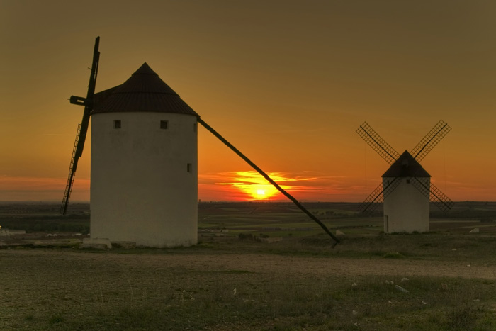 Atardecer en el cerro de los molinos de Mota del Cuervo (Cuenca)